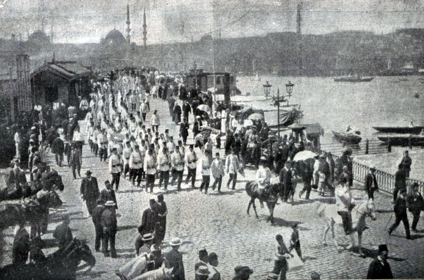 Пехота османской армии (Стамбул, 1912)